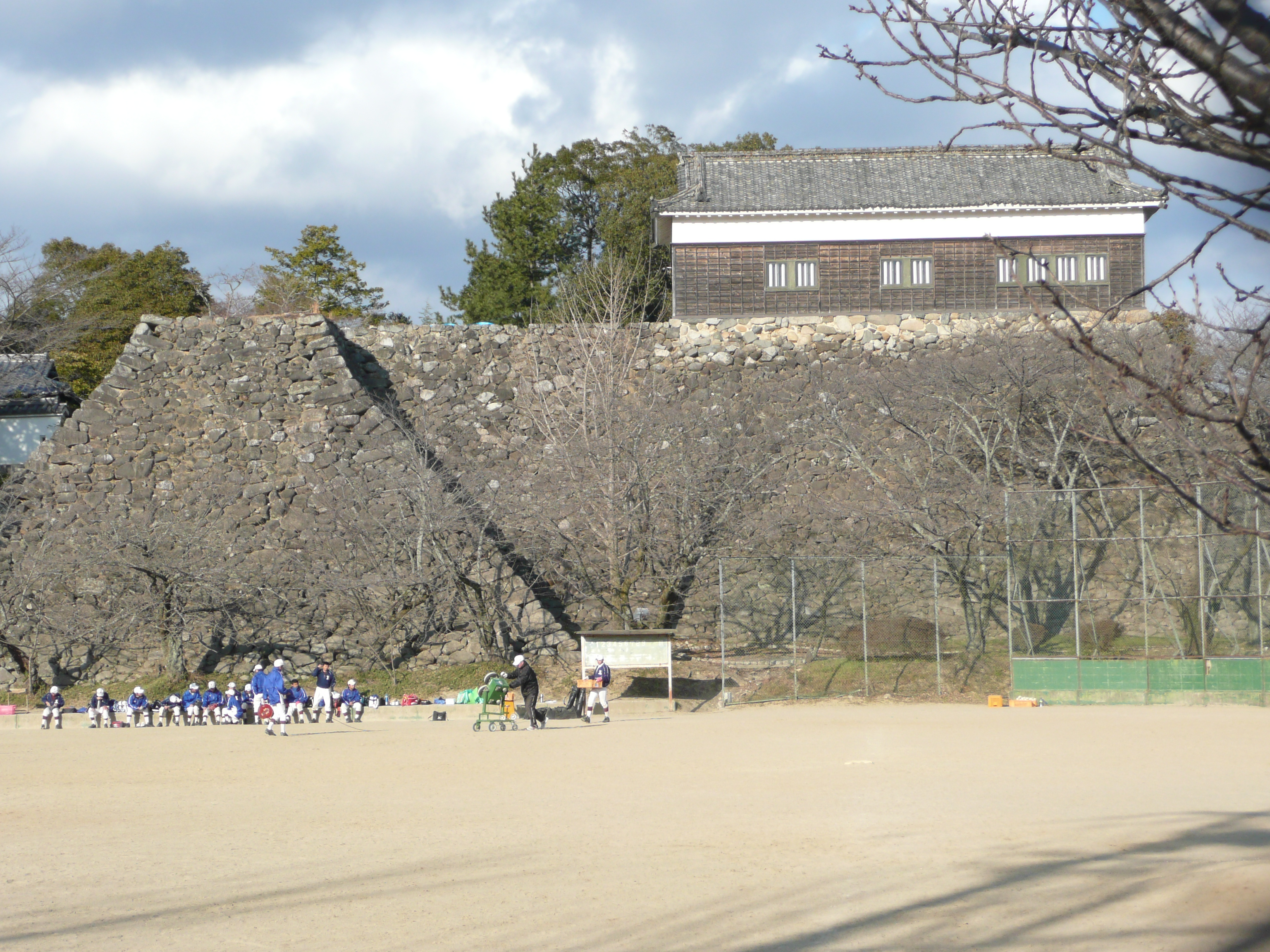 亀山城（伊勢国）の多聞櫓と石垣